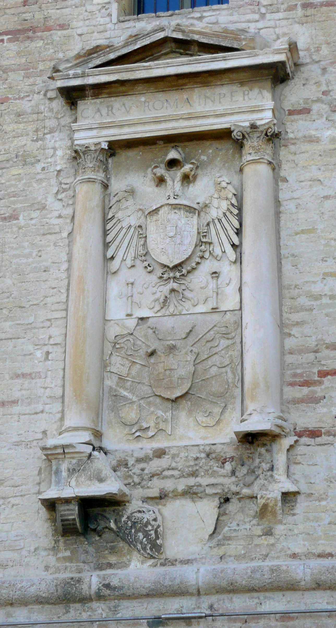 Edicola sulla facciata est della Torre di Martinsicuro, a Martinsiucro, Teramo, Abruzzo, Italia